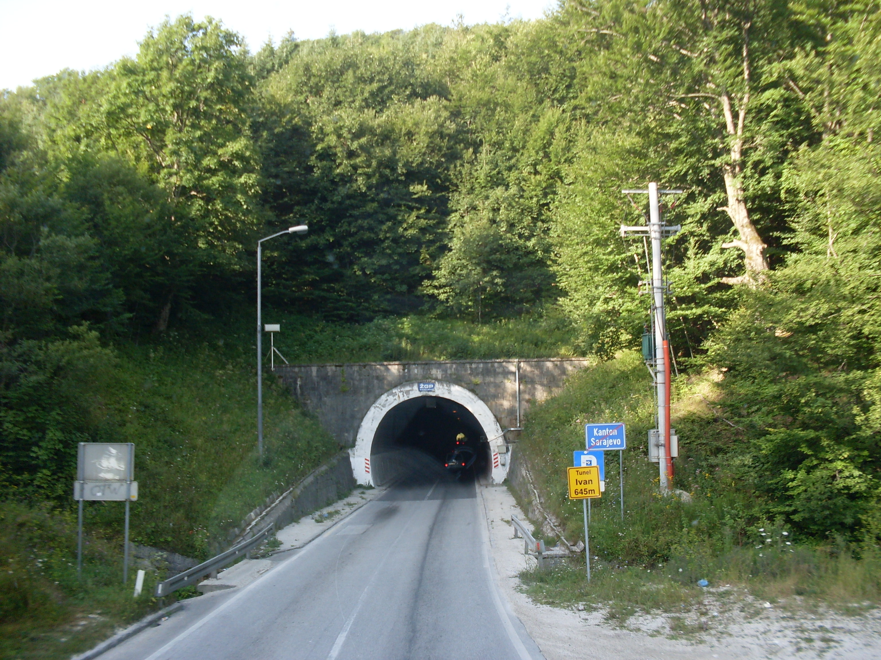 Entrance to tunnel Ivan between Sarajevo Canton and Herzegovina-Neretva Canton